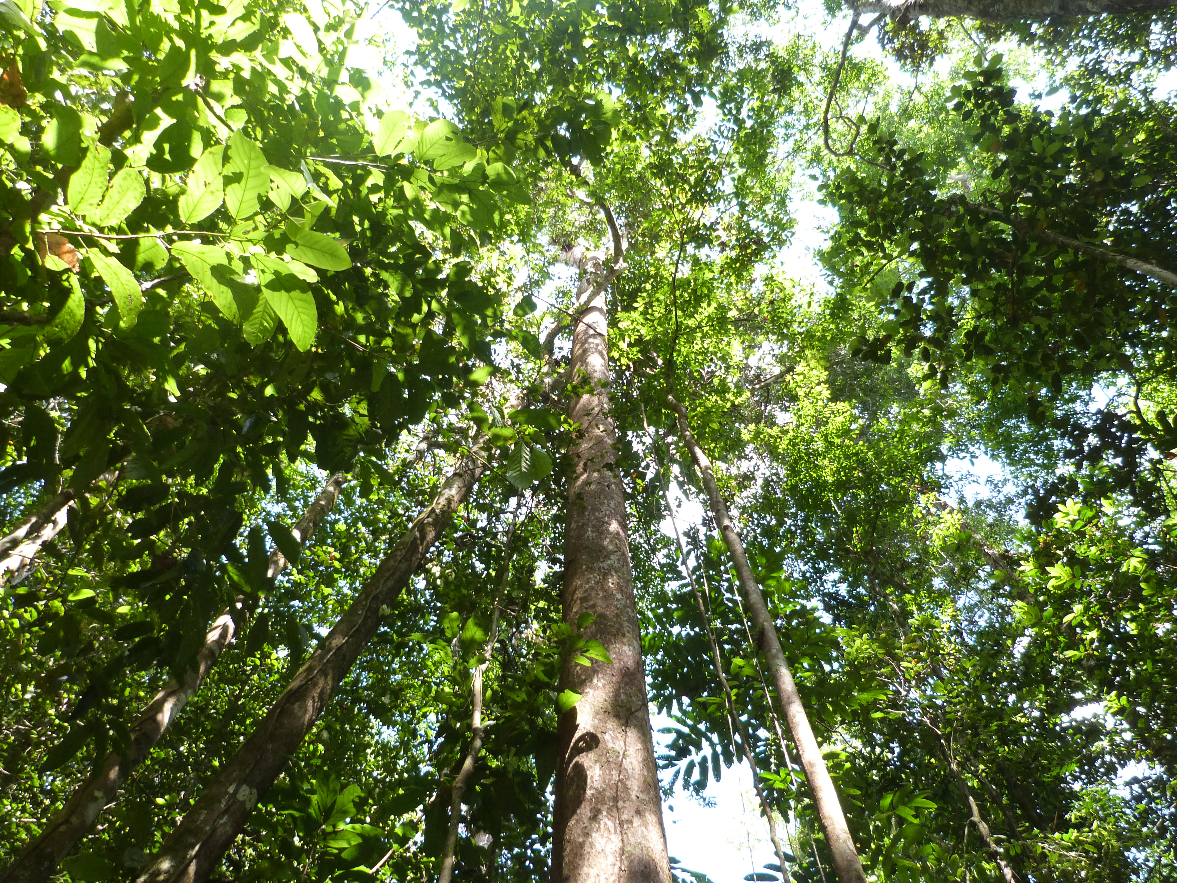 Canopée forêt guyanaise - PNR Guyane